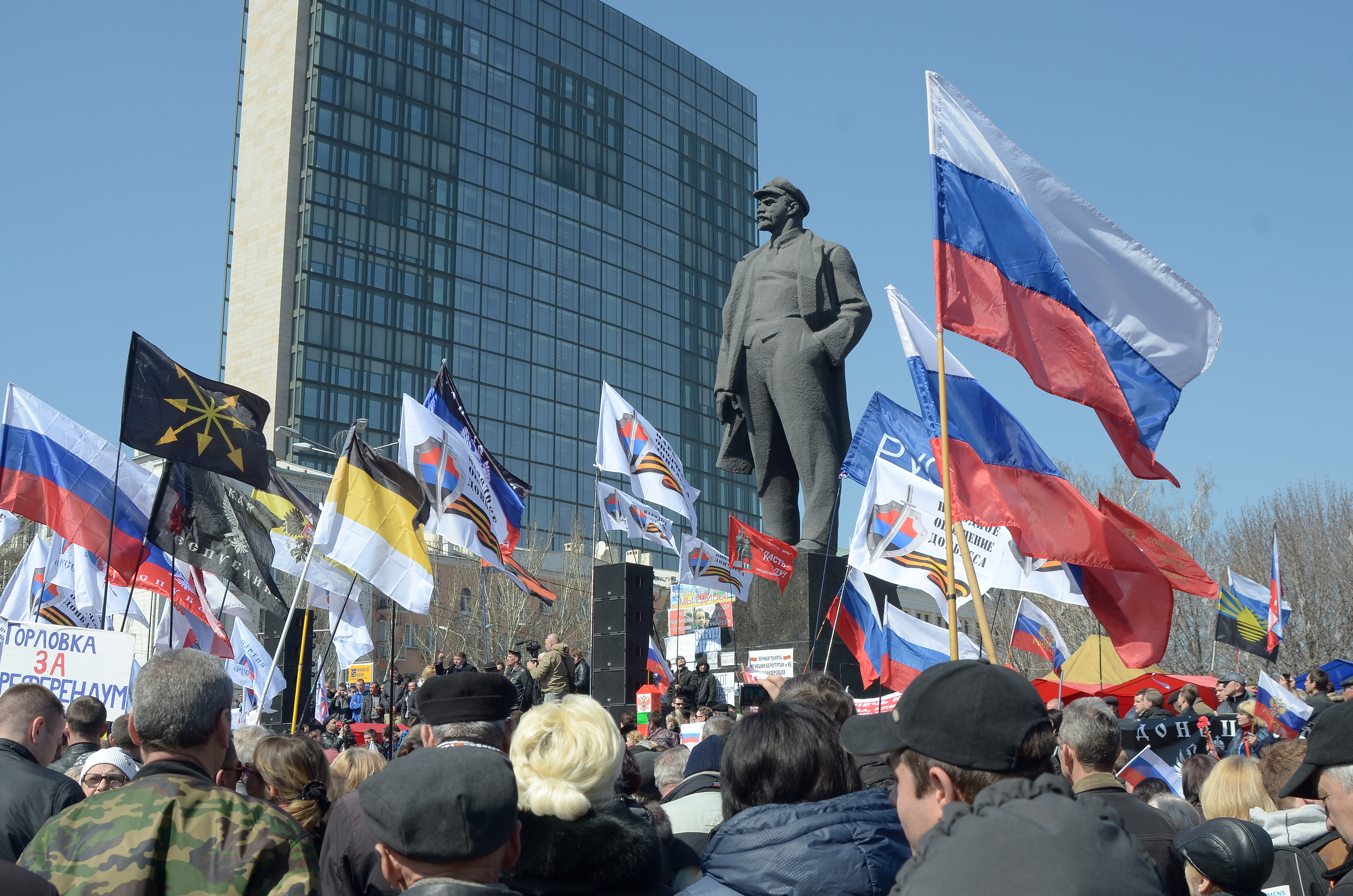 Протесты в Донецке